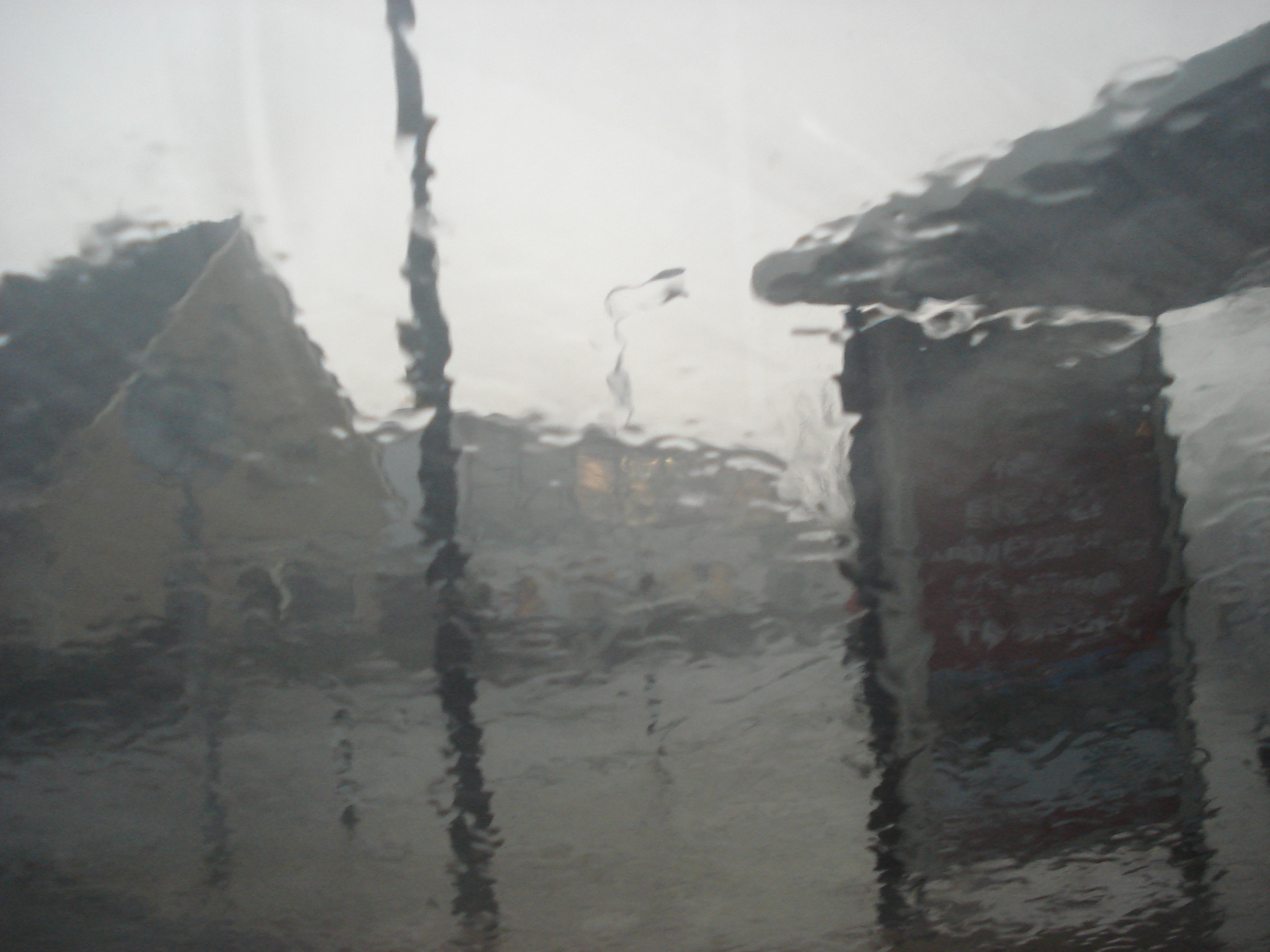 Zelfgemaakte foto op 18 januari 2007 bij Station Hillegom